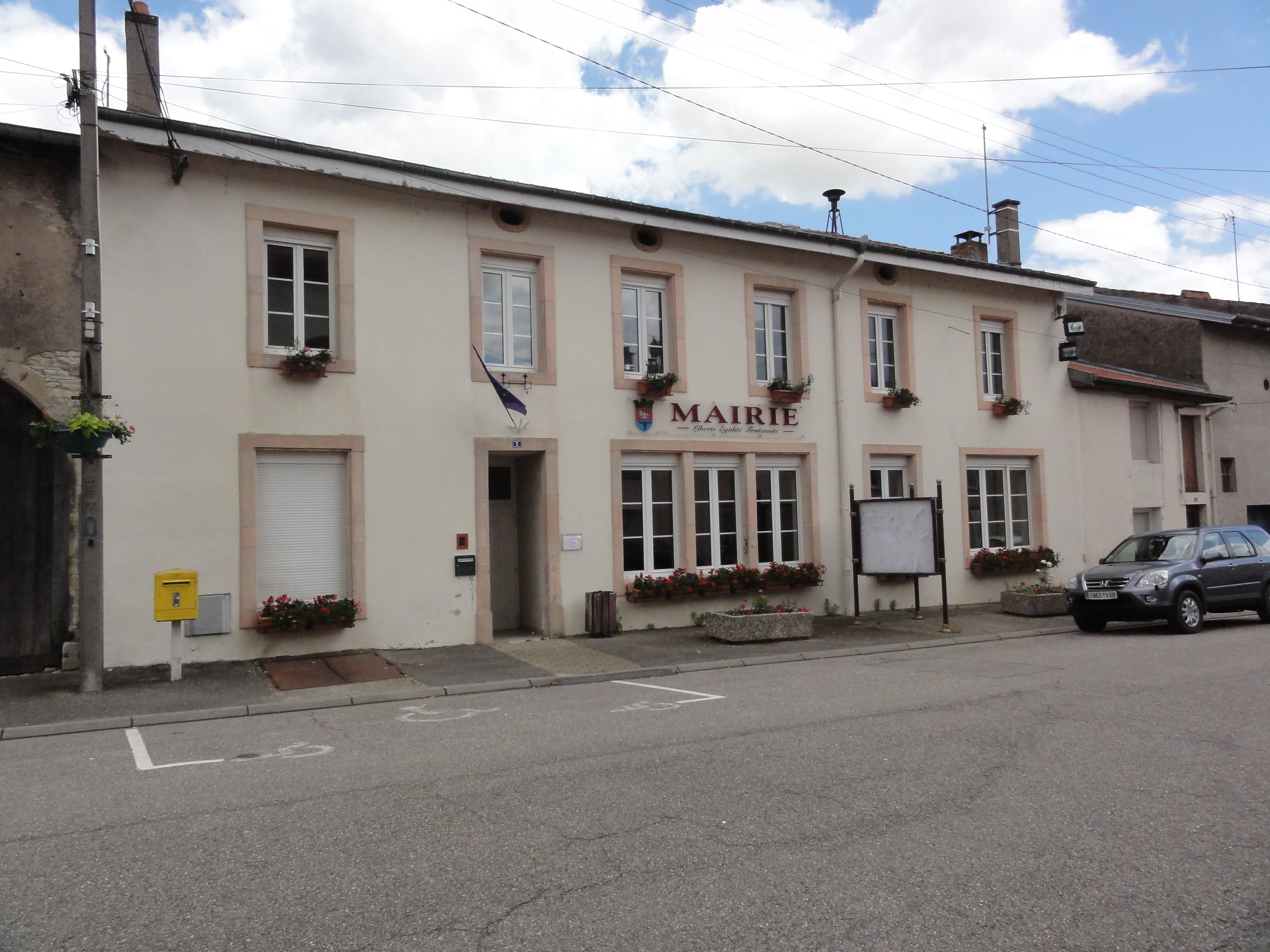 Einville-au-Jard (M-et-M) mairie